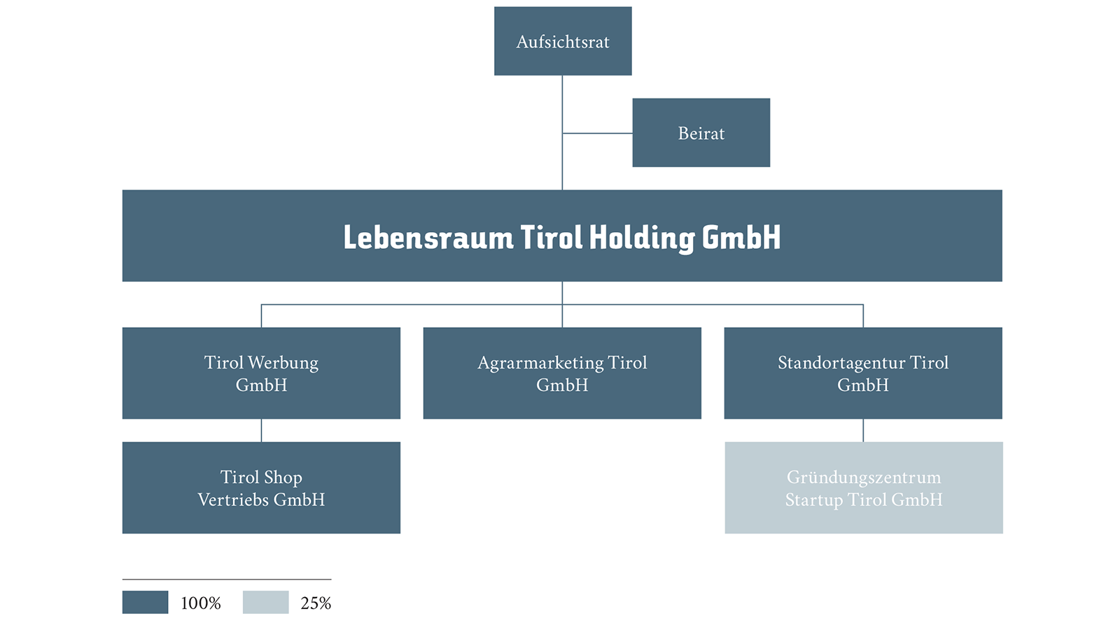 Die Lebensraum Tirol Holding GmbH ist eine 100%ige Landesgesellschaft des Bundeslands Tirol.